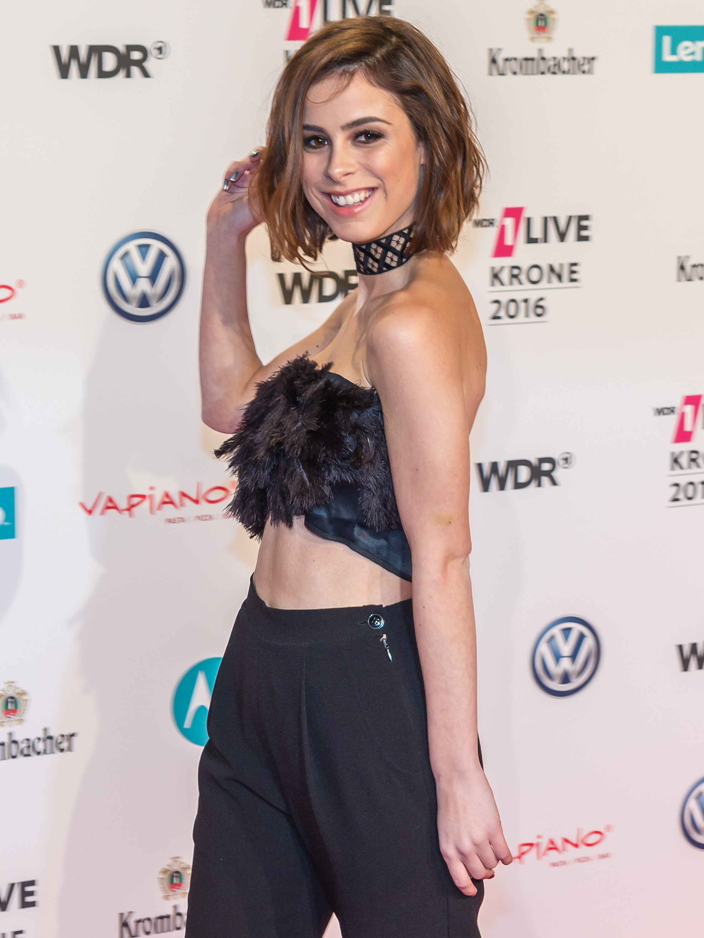 1LIVE Krone 2016 - 1700 - Roter Teppich - Lena Meyer-Landrut